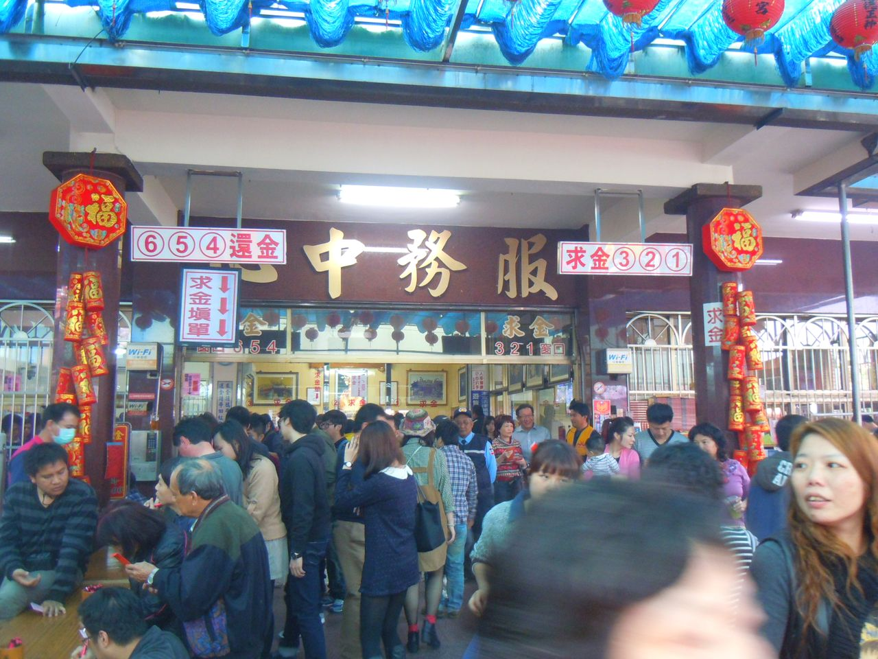 中文(繁體):竹山紫南宮的所在地:南投縣竹山鎮社寮里大公街。